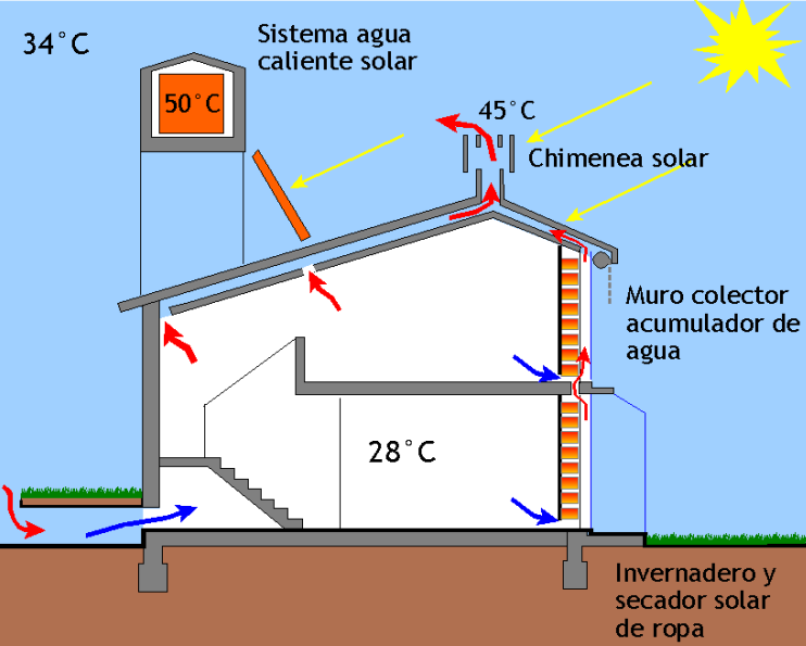 Esquema funcionamiento del sistema de refrescamiento de la casa solar de La Plata. IAS. Buenos Aires, Argentina. 1980.